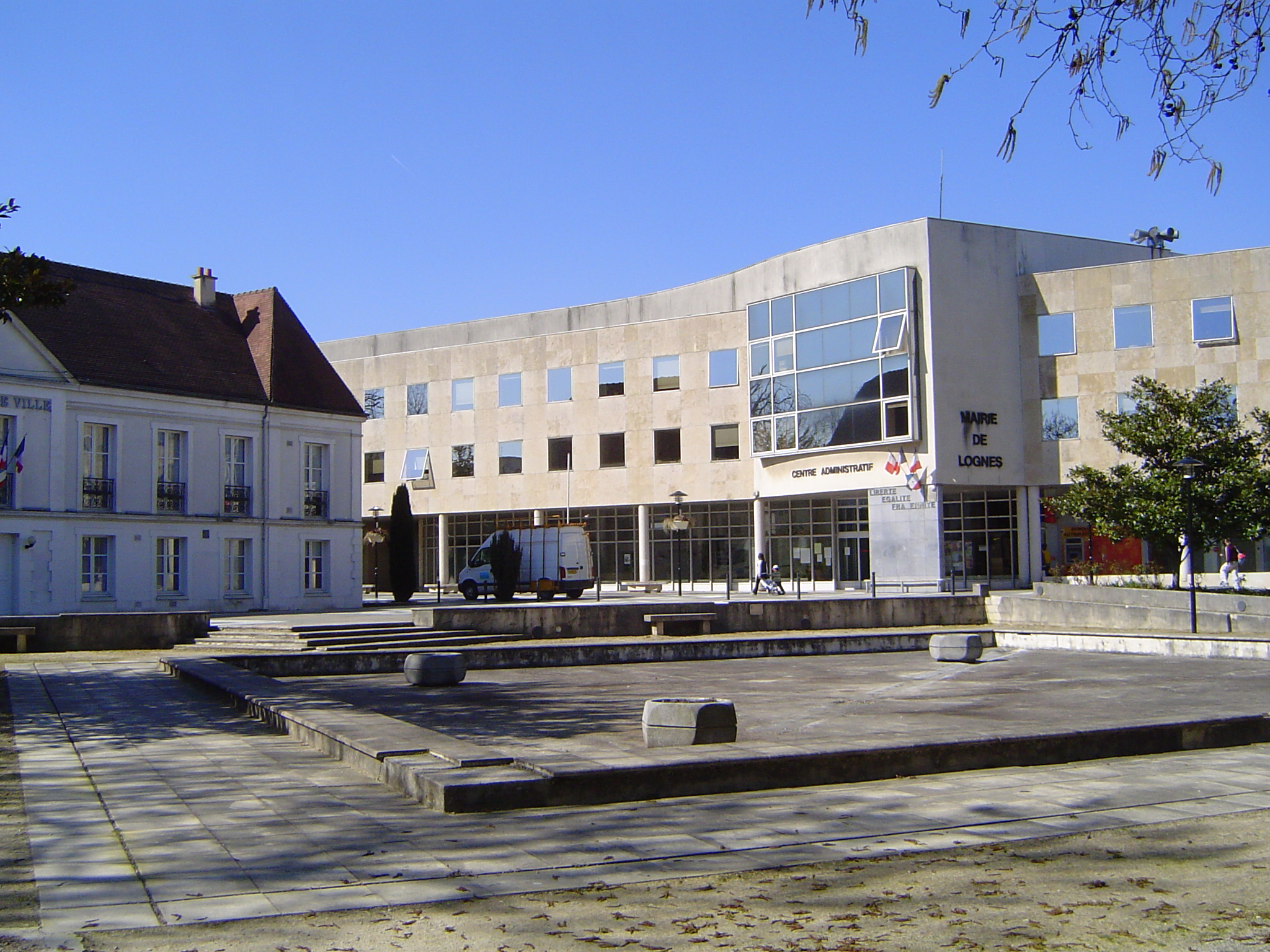 Photos prises à Lognes, commune française de Seine-et-Marne